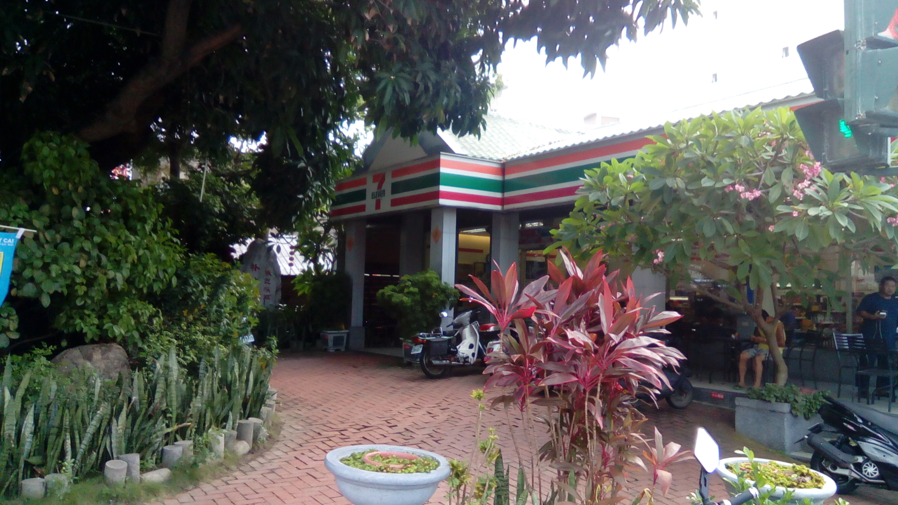 嘉義縣朴子市平和路及光復路口，具有庭園風格的統一超商朴站門市。